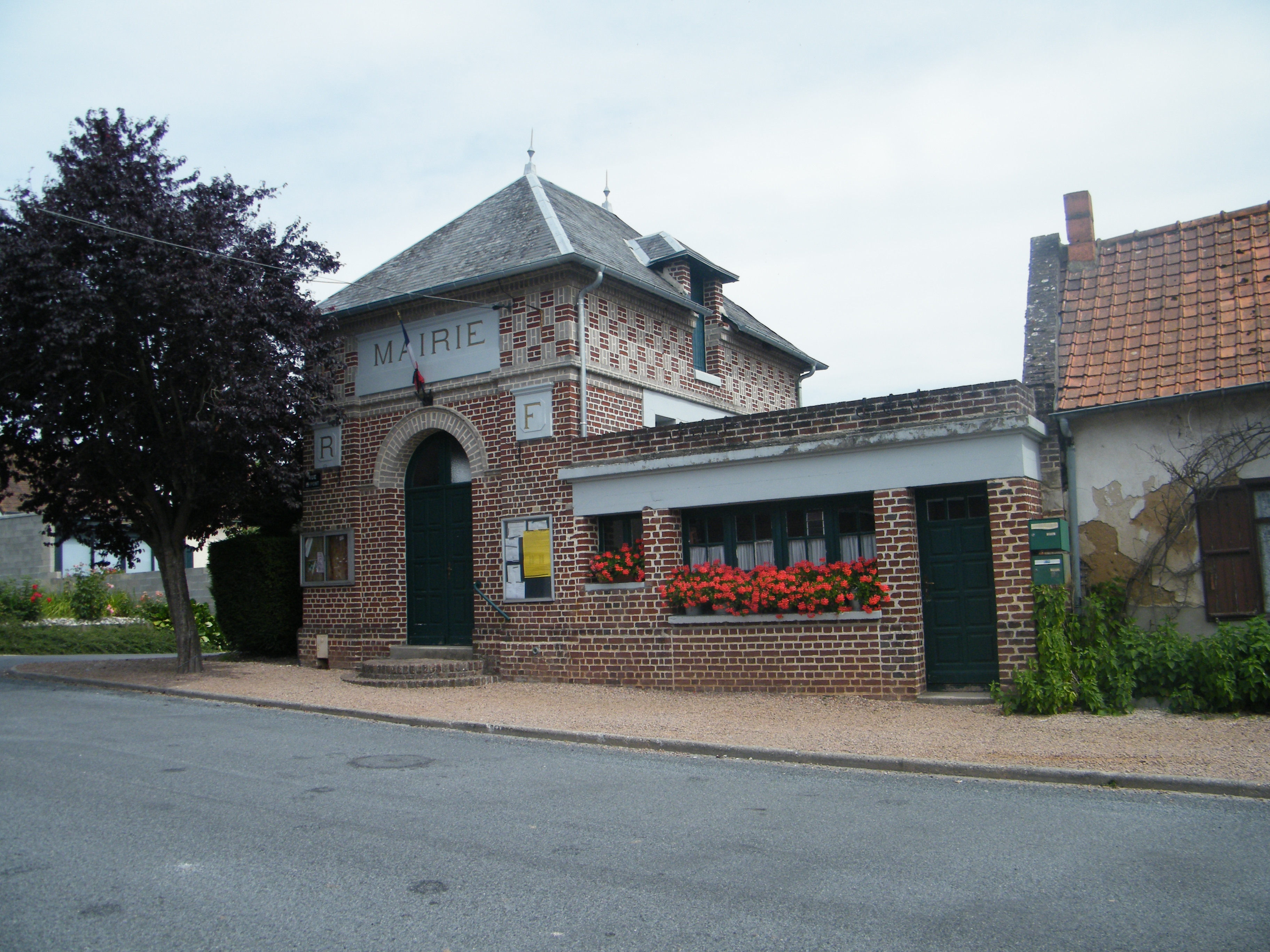 Eaucourt, Somme, mairie.